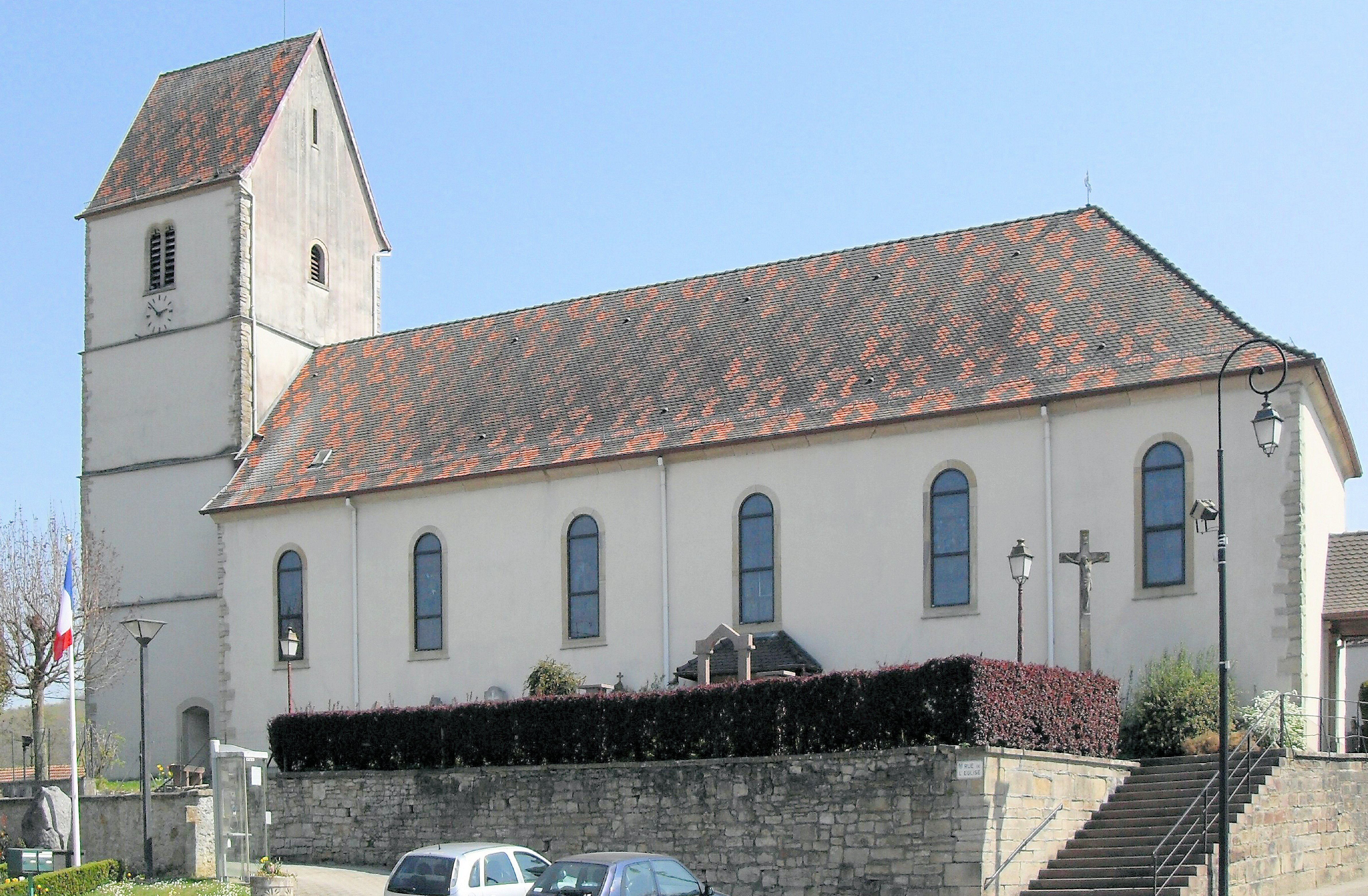 L'église Saint-Laurent d'Aspach